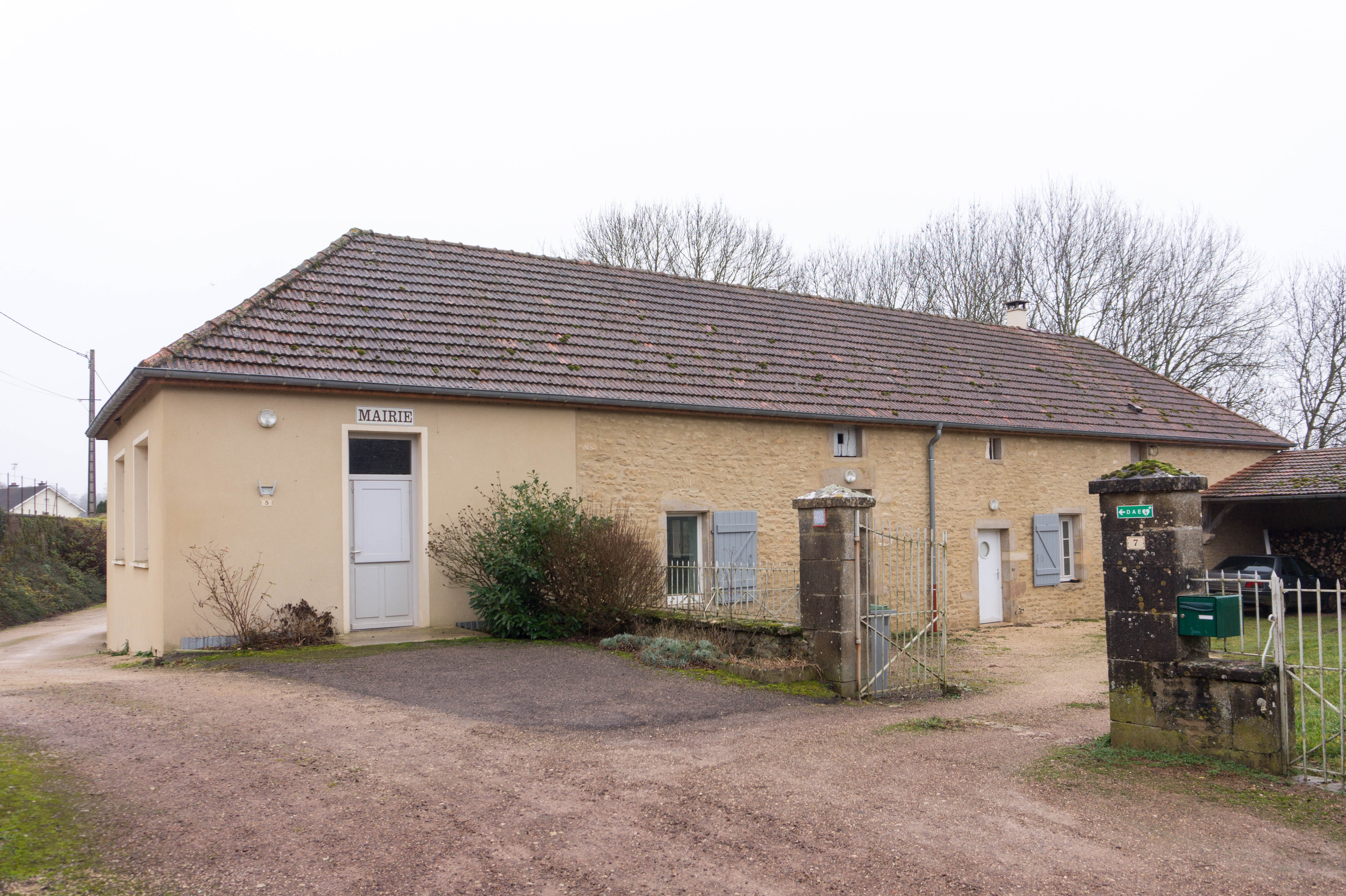 Mairie de Dampierre-en-Montagne